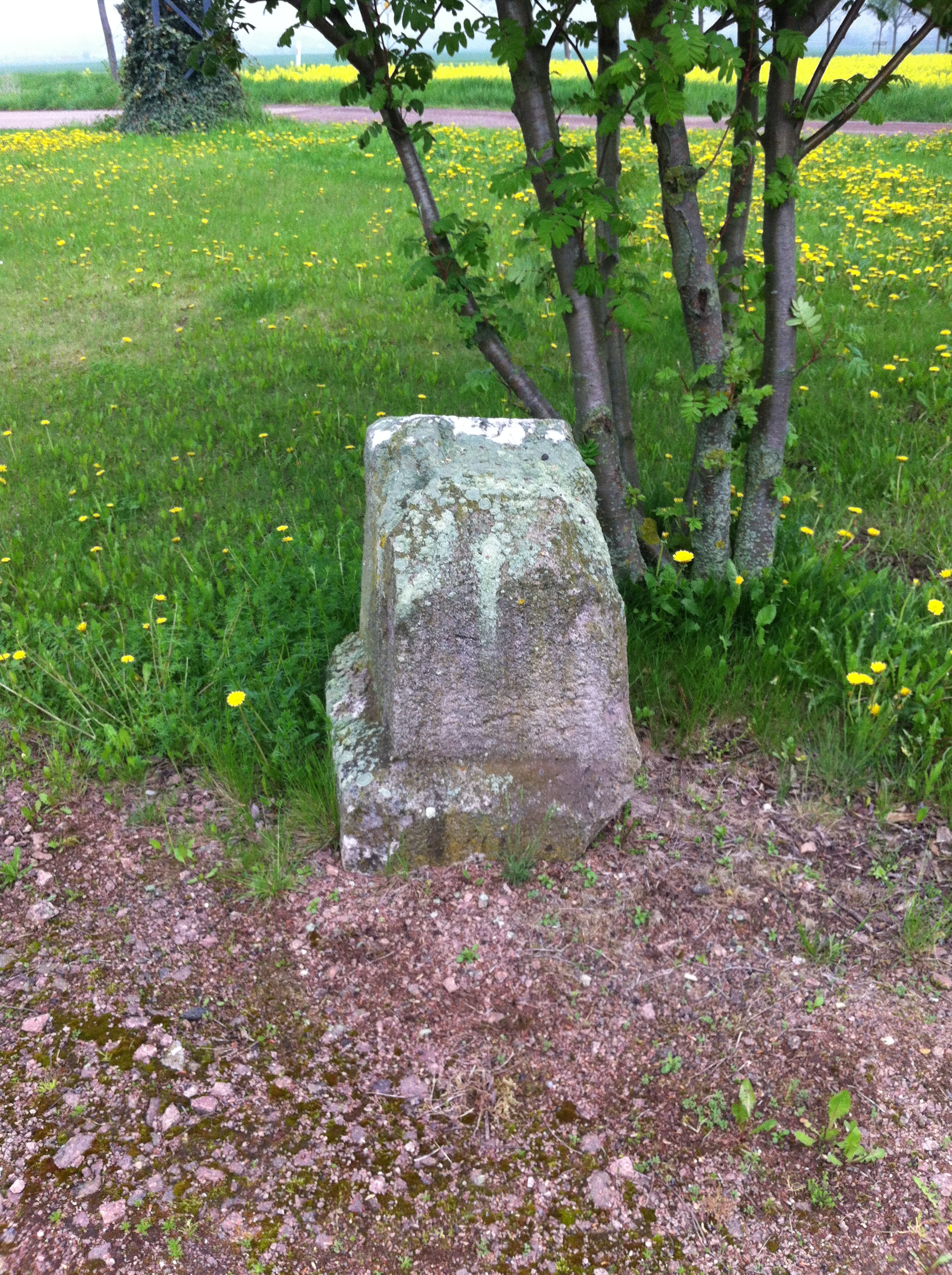 Fragment eines Preußischern Meilensteins beim Sattelhof. Von dem Obelisk ist nur der untere Teil des Steins vorhanden.